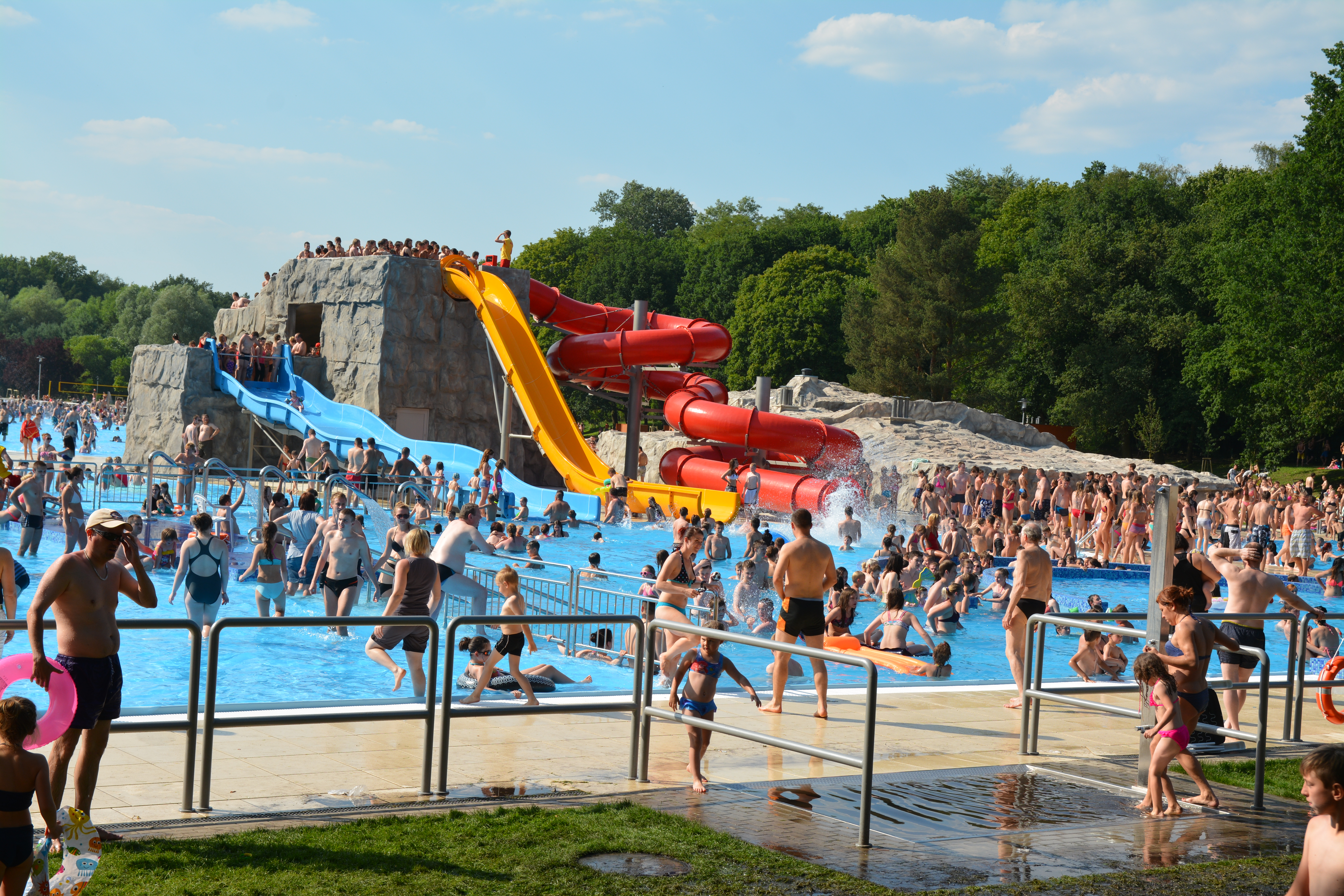 Kompleks Rekreacyjny Arkonka w Szczecinie